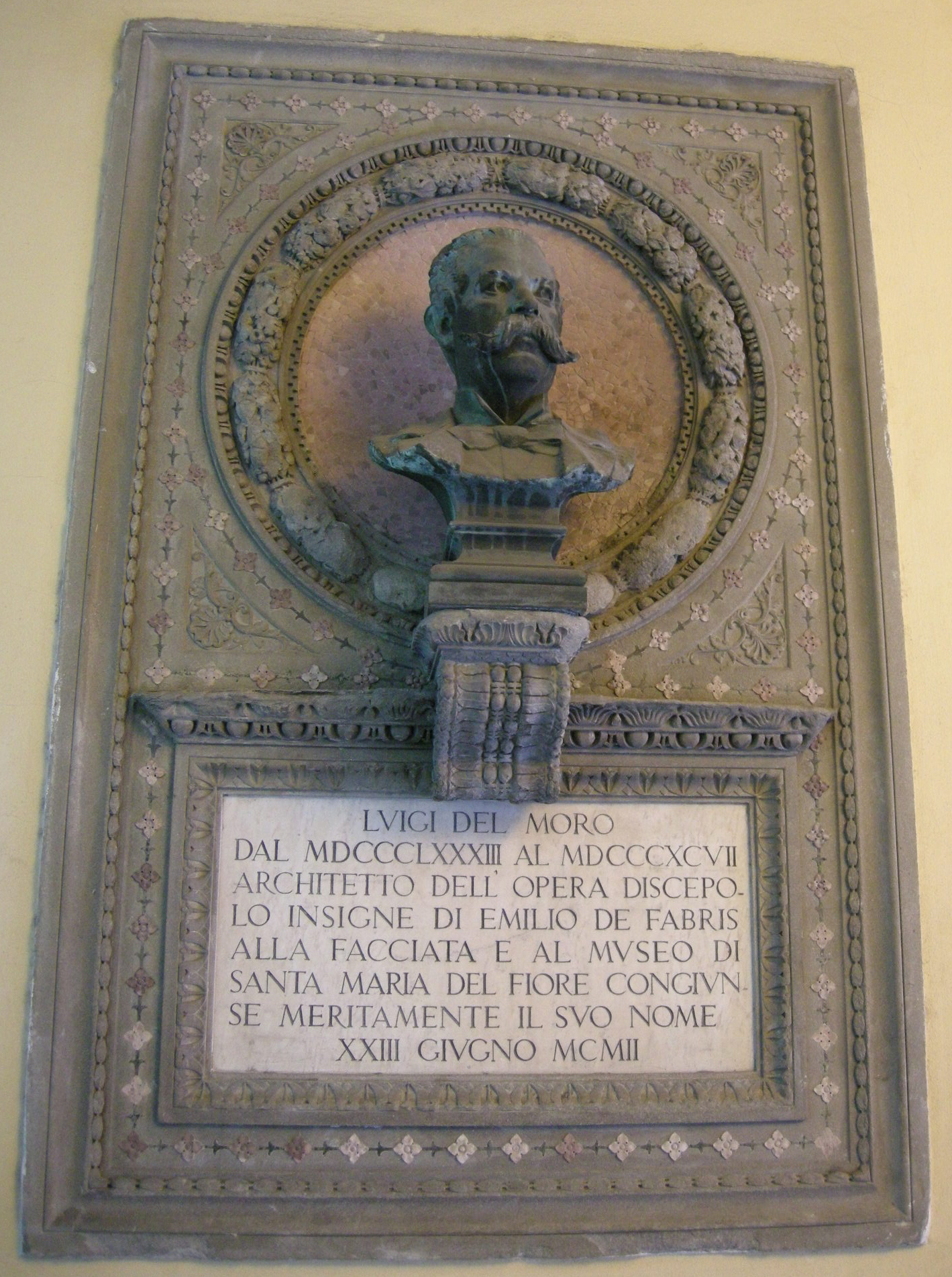 Opera del duomo, targa e busto luigi del moro